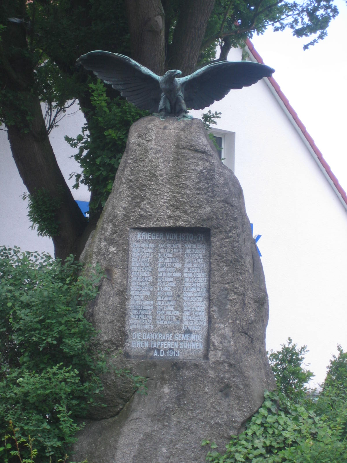 Denkmal für die Kriegsteilnehmer 1870/71 aus dem Dorf Besse, gestaltet 1902 von Leopold Fleischhacker in Besse bei Edermünde